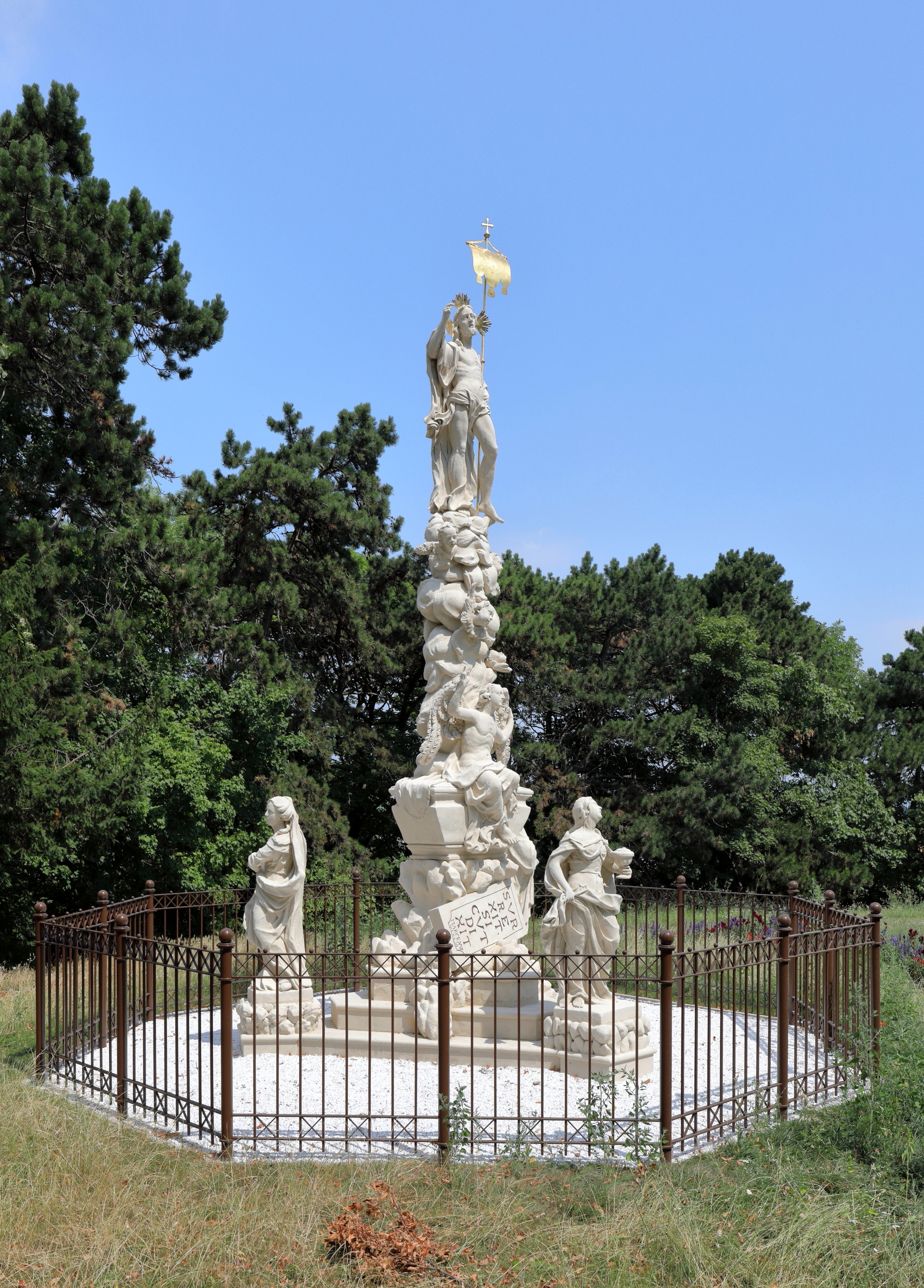 Die Auferstehungs- bzw. Heilandssäule in der niederösterreichischen Marktgemeinde Perchtoldsdorf.Das 7,90 m hohe sakrale Bildwerk ist eine Stiftung des vermögenden Perchtoldsdorfers und Wiener Ratsmitgliedes Johannes Sebastian Deyl und wurde 1743 von einem unbekannten Barockbildhauer geschaffen. Im Zuge einer Generalsanierung um rd. 70.000,- Euro wurde sie 2015 abgetragen und anschließend etwas nördlicher am Hügelplateau „Luisenruhe“ aufgestellt. Die feierliche Neusegnung fand am 28. August 2016 statt.